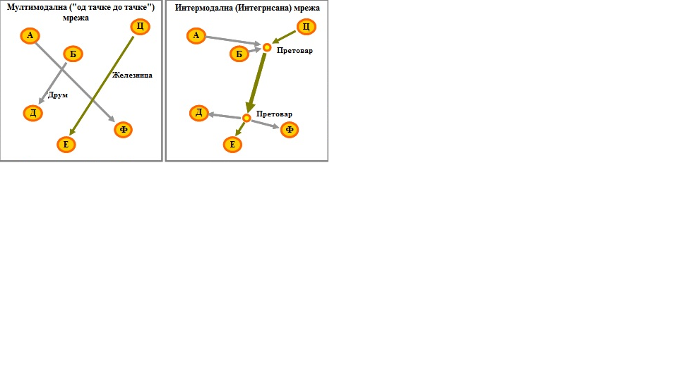 Мултимодална и интермодална танспортна мрежа